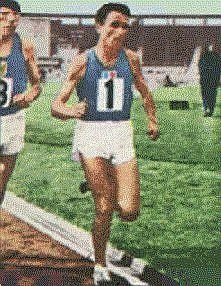 Michel Jazy (1960, JO), 'Panini Olympia 1896 - 1972', Panini figurina n°205.